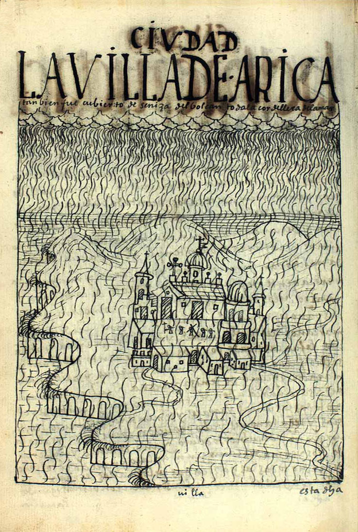 La villa de Arica, cubierta de ceniza volcánica por la erupción del volcán Huaynaputina en Nueva crónica y buen gobierno (1615). "LA VILLA DE ARICA tanbién fue cubierto de seniza del bolcán toda la cordellera de la mar".